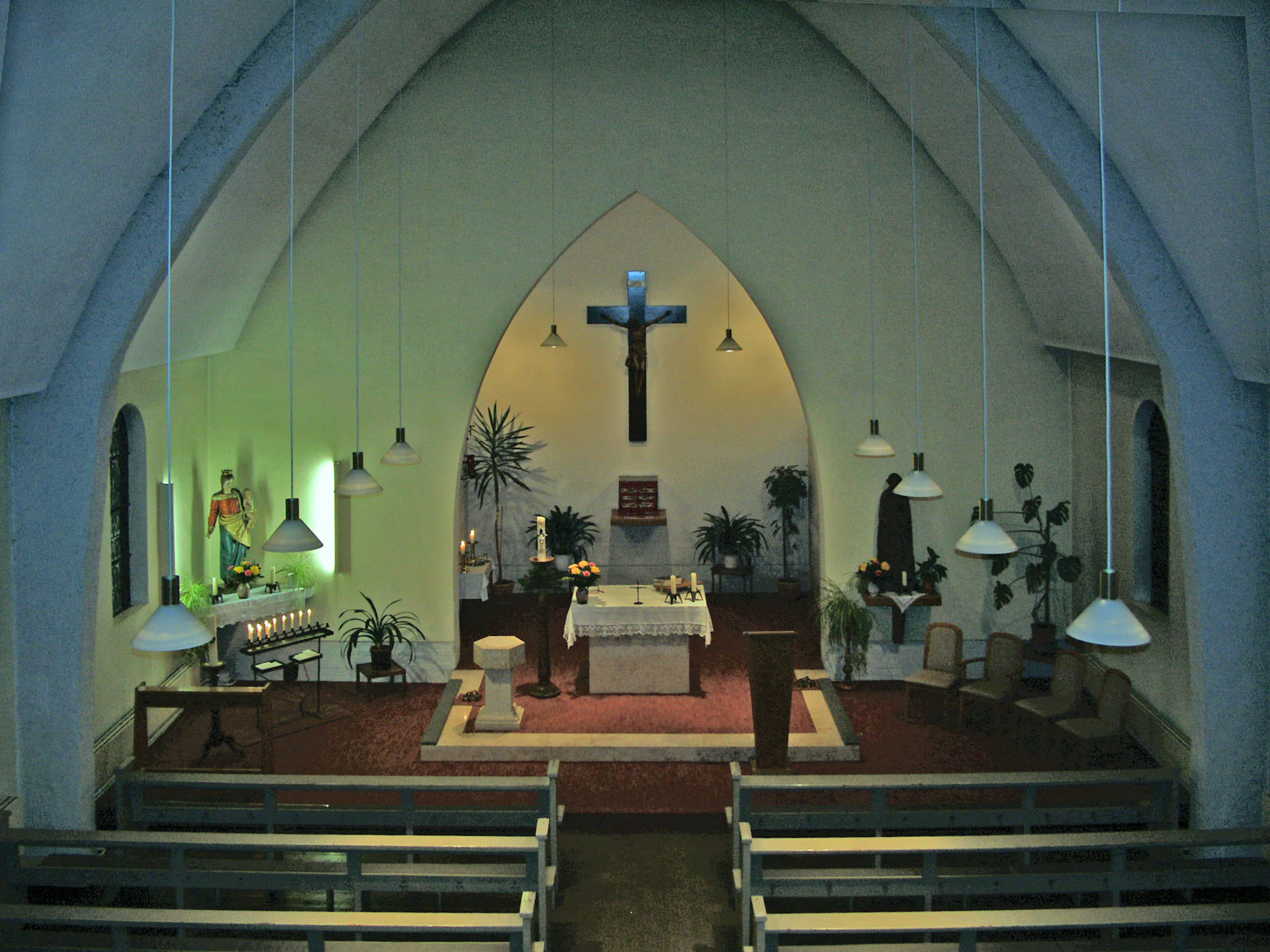 Katholische Kirche "Heilige Familie" in Offleben, Ortsteil von Büddenstedt, Landkreis Helmstedt.